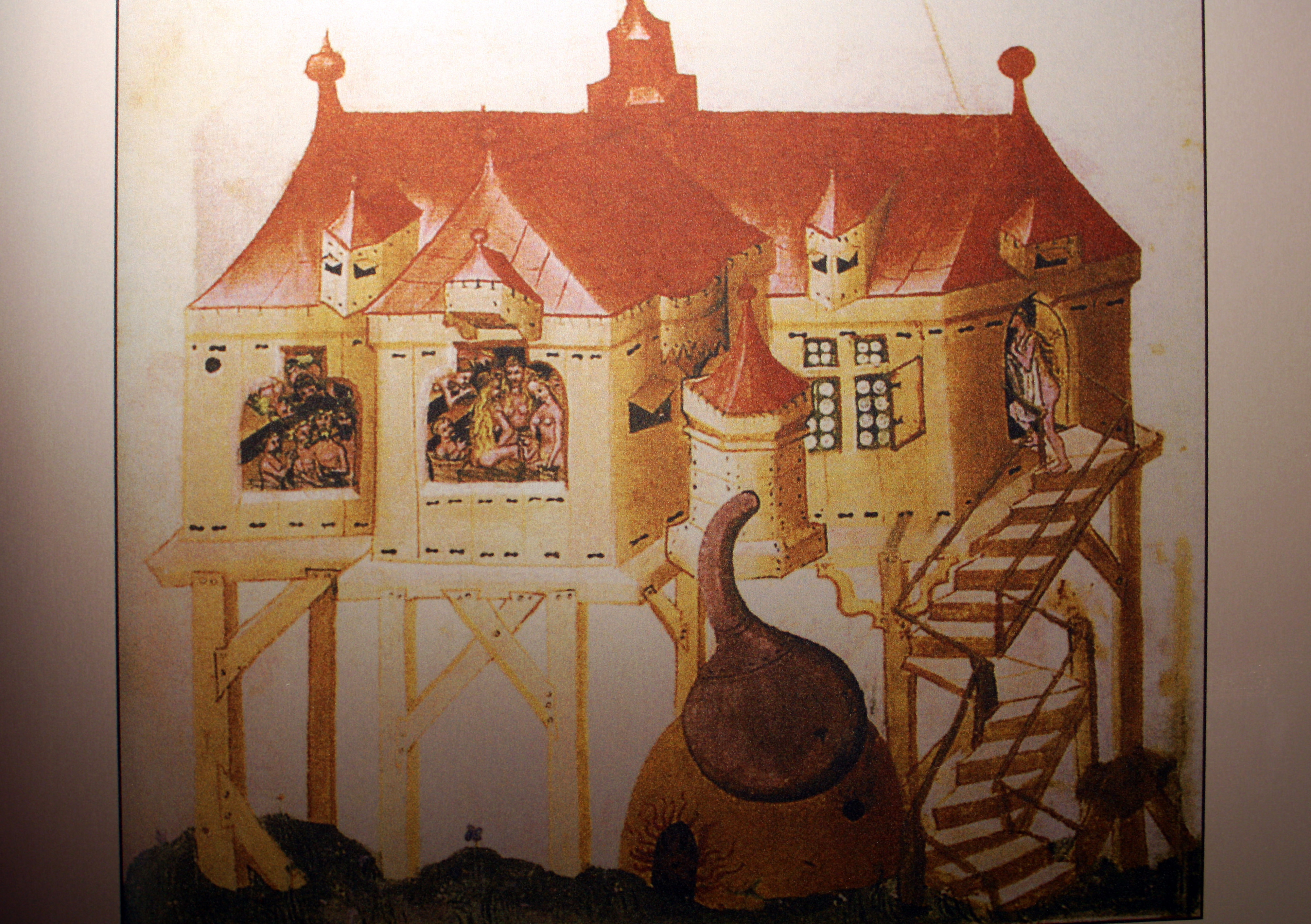 Museum der Badekultur, Zülpich.